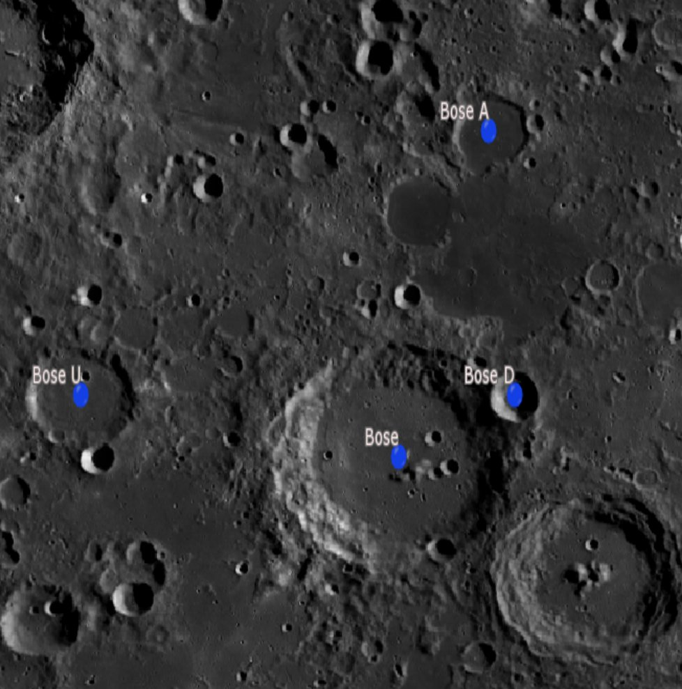 Cráter lunar Bose. Cráteres satélite. (Imagen LRO)